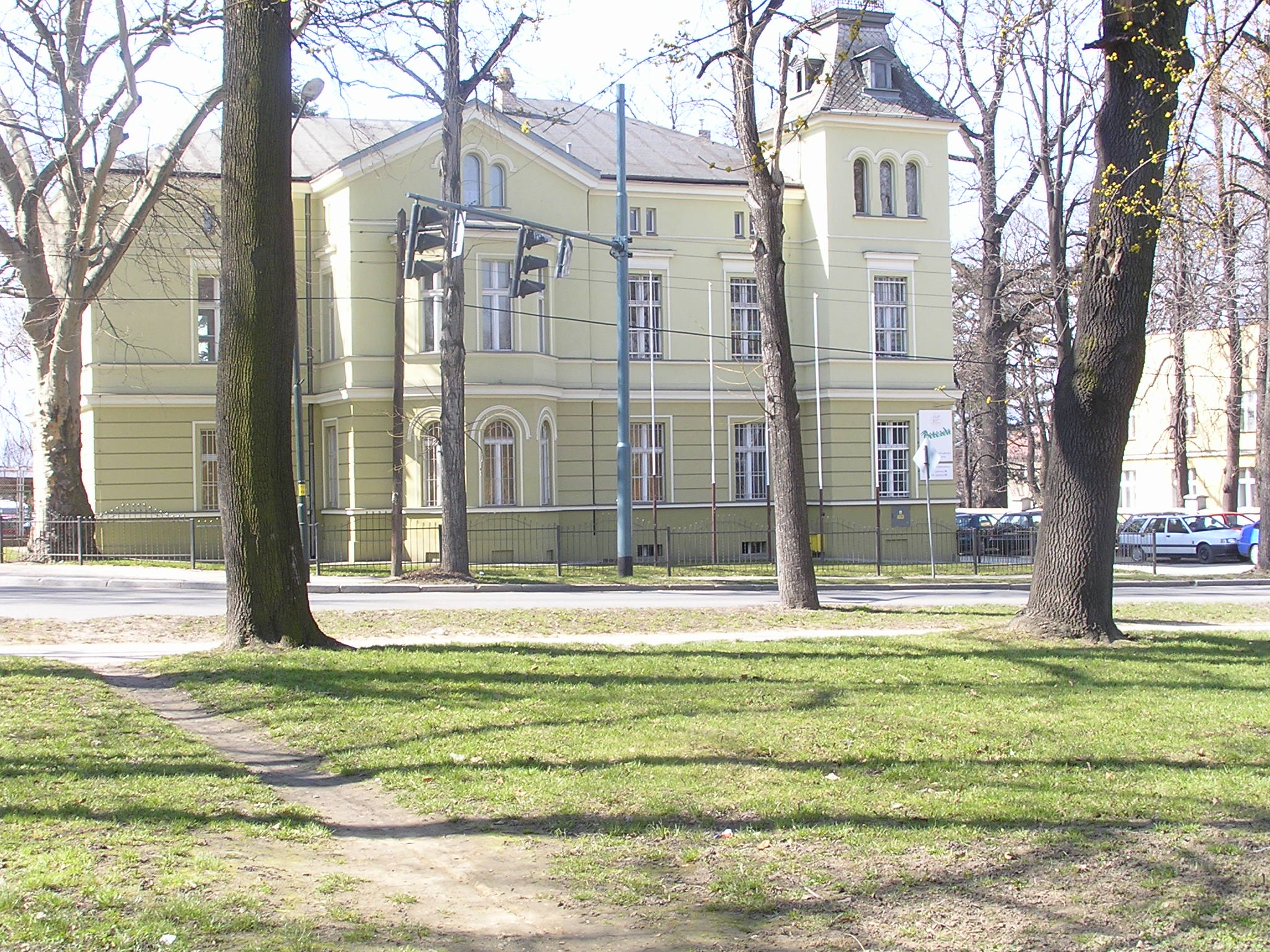 Kościół Zielonoświątkowców w Dzierżoniowie